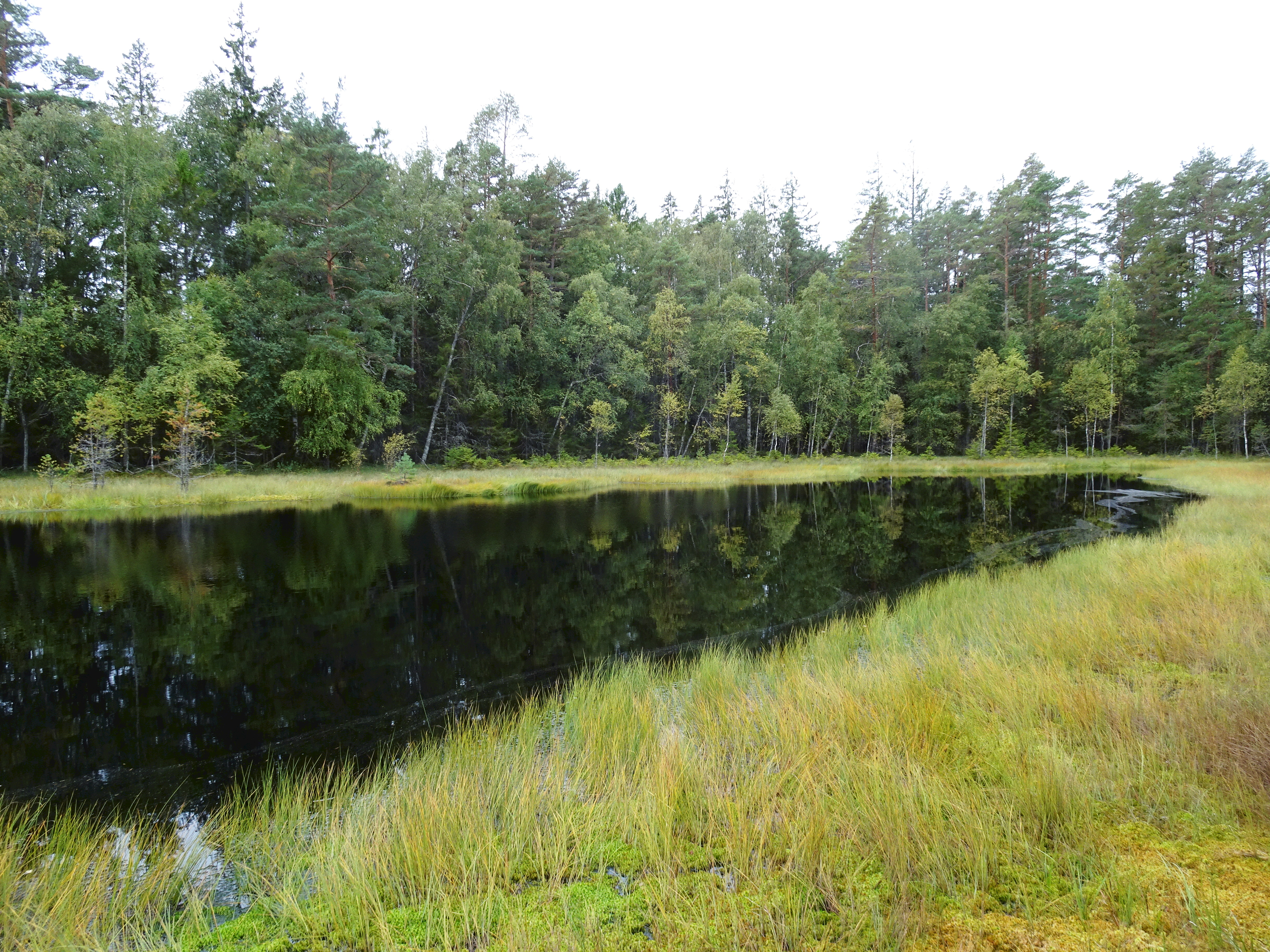 Igelsjöskogens naturreservat med Igelsjön